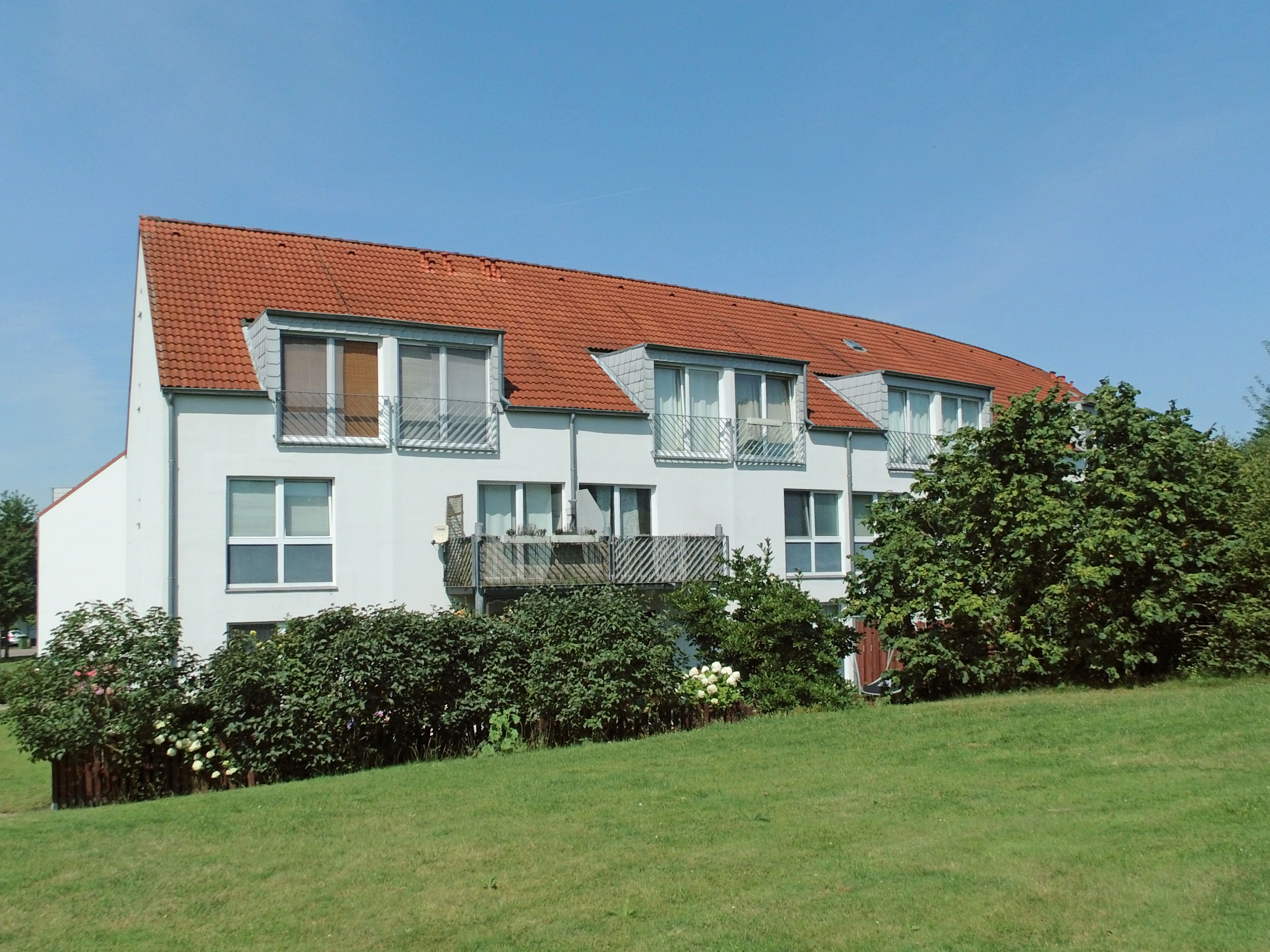 Wohnhaus aus den 1990er Jahren in der Siedlung "Hageberg-West" im Wolfsburger Stadtteil Hageberg